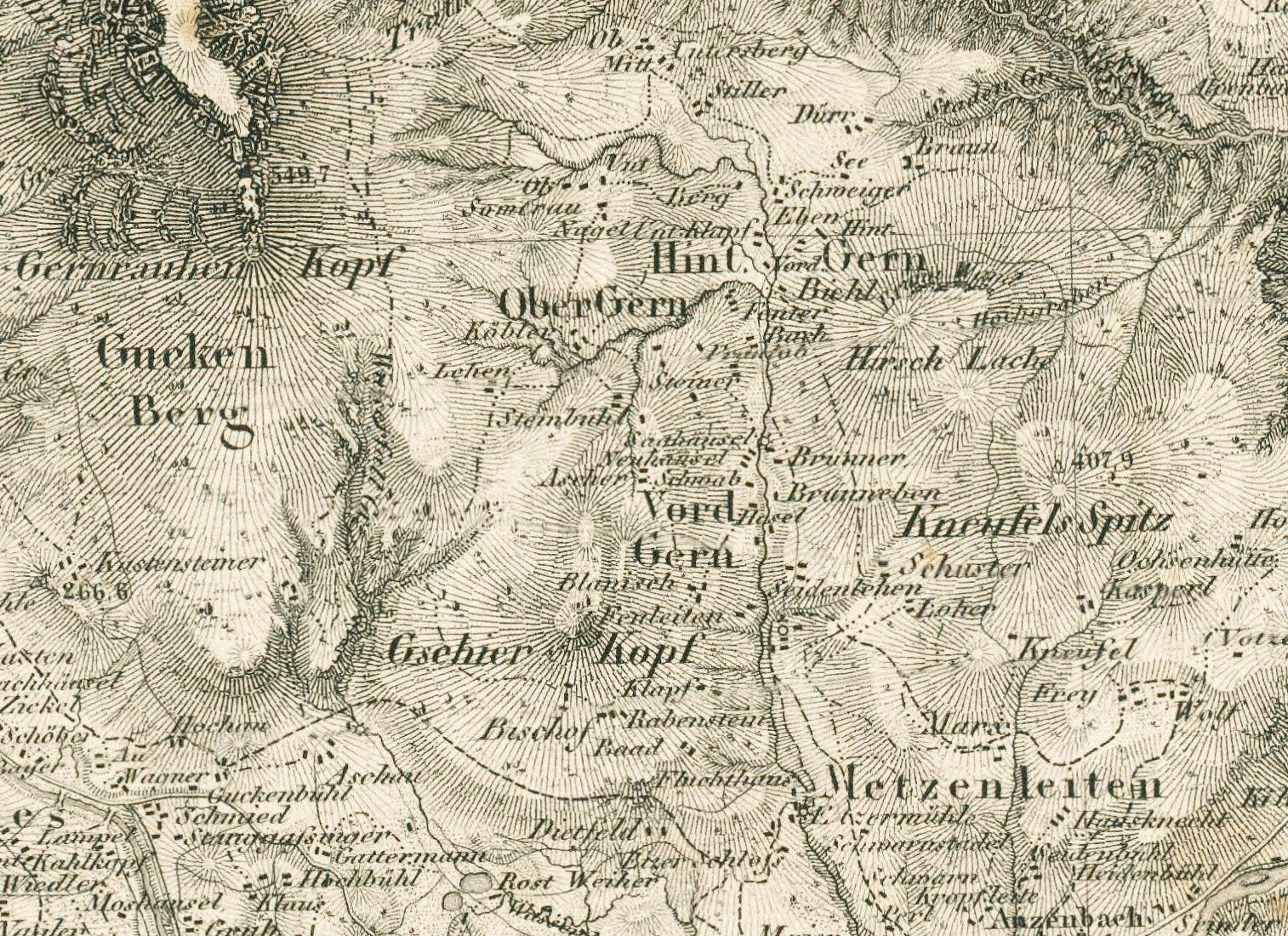 Das Gebiet der Gerner Gnotschaften auf einer Karte von 1826